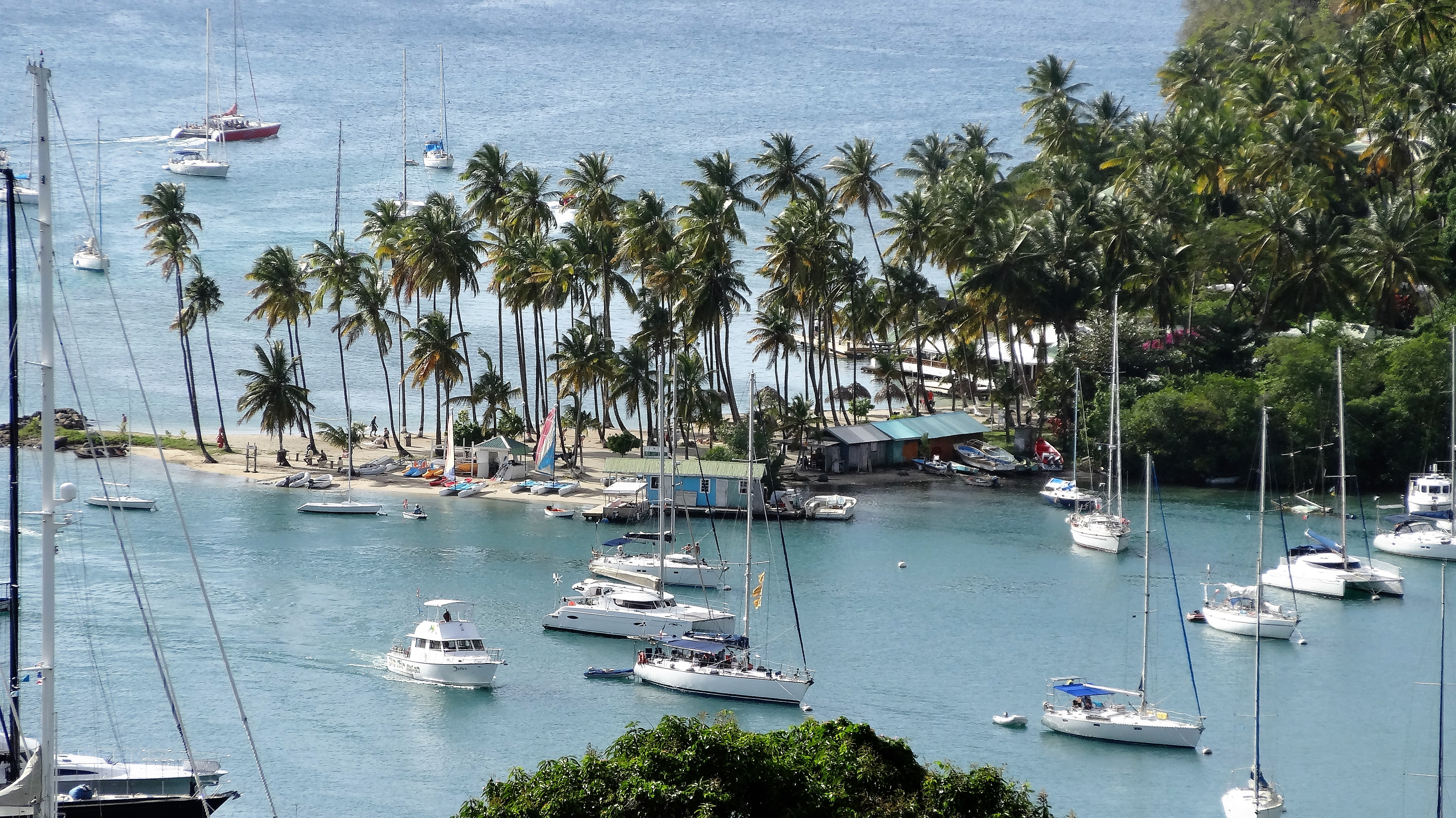 Segelboote in einer Bucht der Insel Santa Lucia, Karibik.